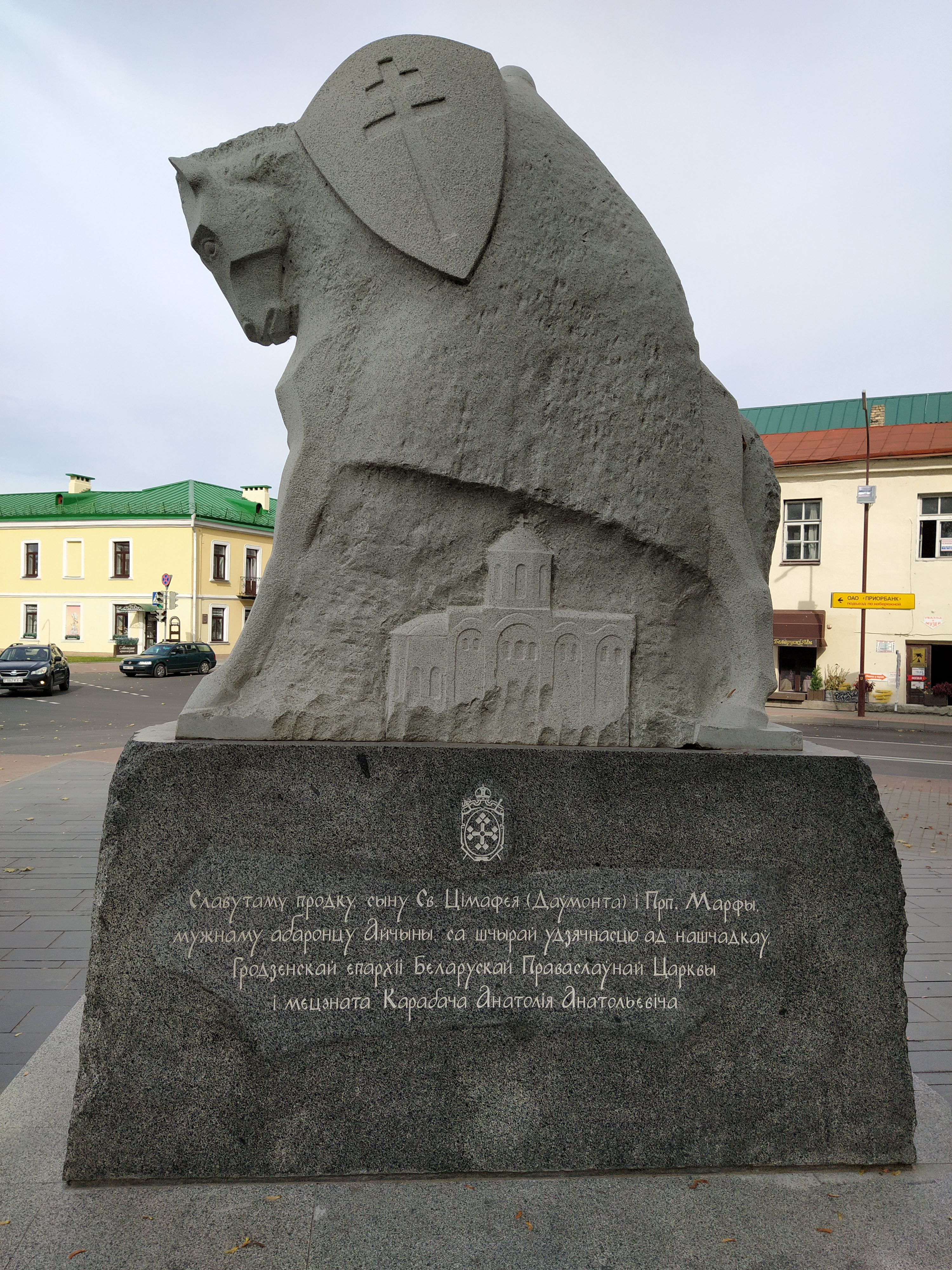 Pomnik Dawida Dowmontowicza (Grodzieńskiego) w Grodnie.